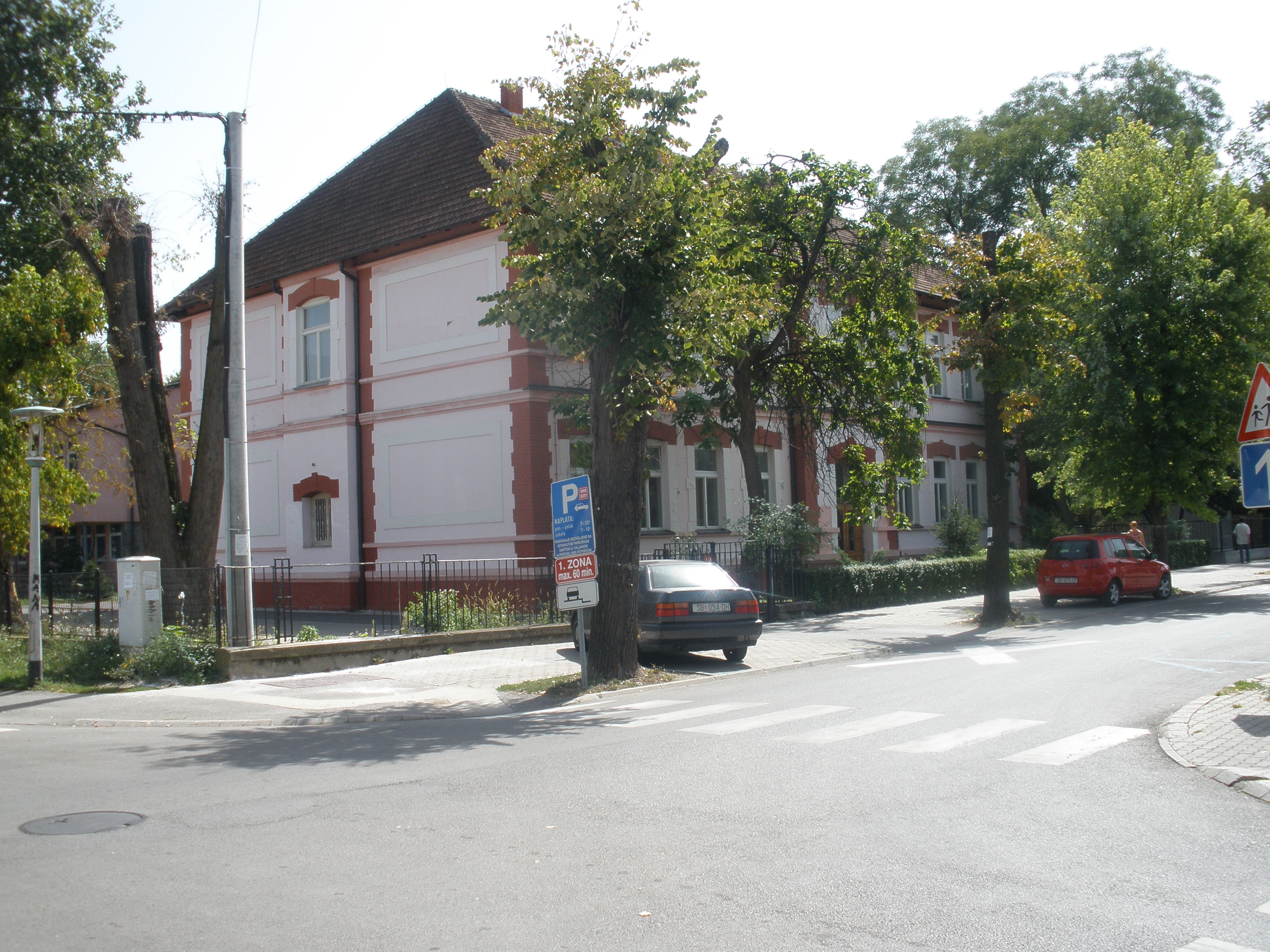 Srednja medicinska škola u Slavonskome Brodu (bivša osnovna "Vladimir Nazor").